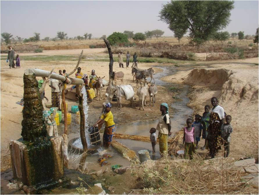 JIRCAS「アフリカ土壌」プロの現地サイトの一つであるモウレイコアラゼノ村の自噴井戸へ水を求めて集まってくる人、動物。写真奥に見えるのが柵で囲まれた 乾季の野菜畑。「アフリカ土壌」プロでは水を利用した乾季の野菜栽培と雨季作のローテーションによる土壌肥沃度の維持・管理を実践しています。 【ニジェール、ファカラ（モウレイコアラゼノ村）、2008年1月】